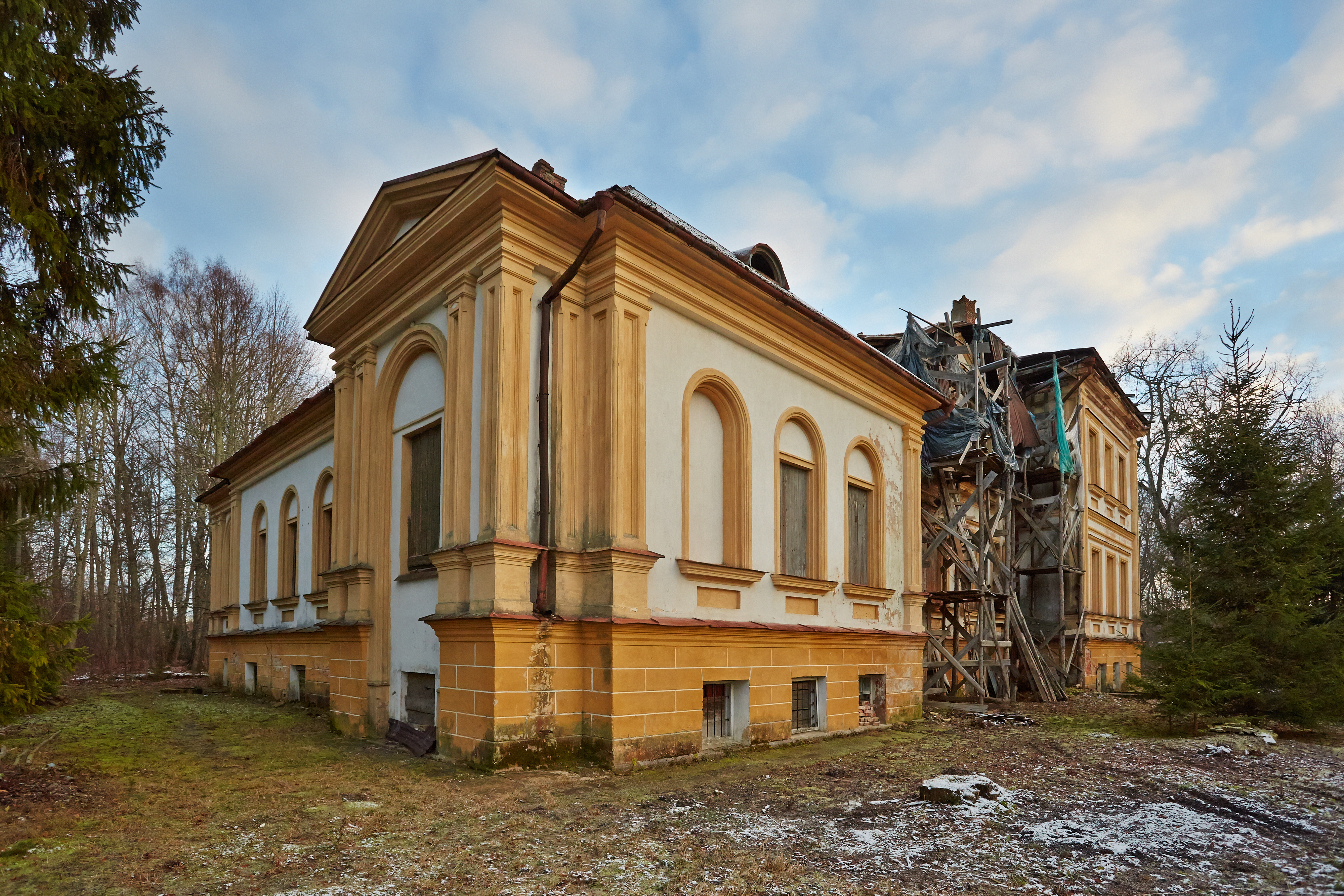 Vana-Nursi mõisa peahoone 2013. aastal